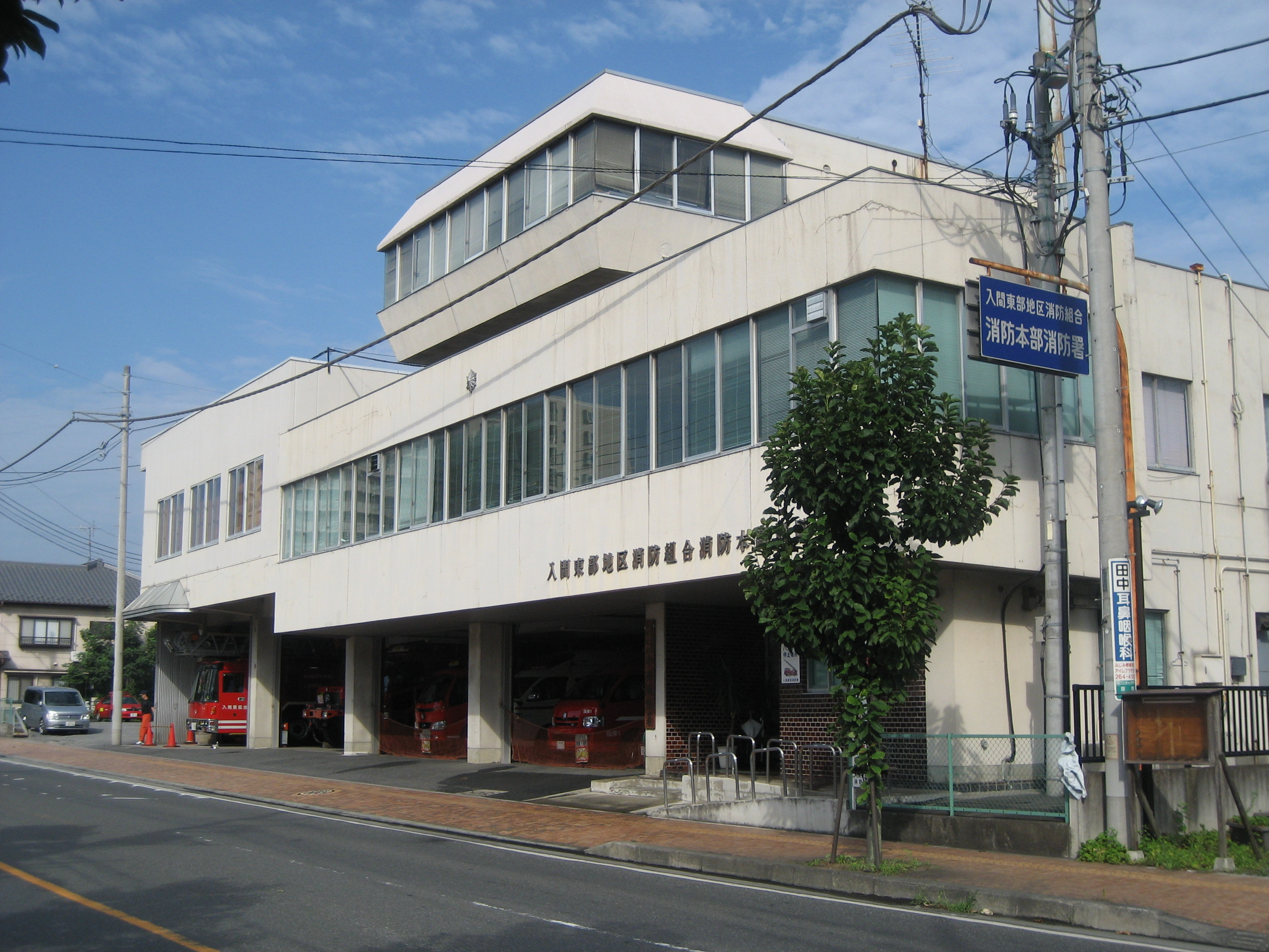 入間東部地区消防組合消防本部庁舎